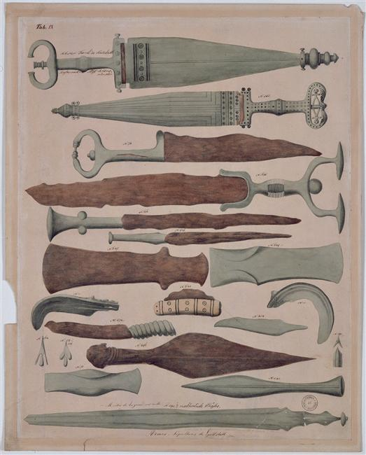 Mobilier funéraire issu de la campagne de fouilles de la nécropole de Hallstatt entre 1846 et 1863.